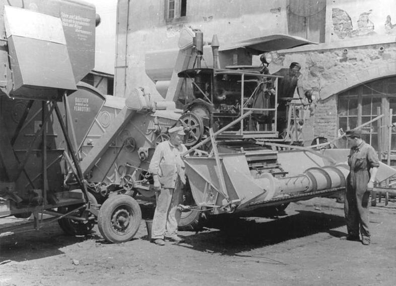 Barnitz, Wartung eines Mähdreschers Zentralbild Siegert 15.6.1955 Erntevorbereitungen auf der MTS Barnitz, Krs. Meißen Bis jetzt haben die Kollegen der MTS Barnitz ihr Erntereparaturprogramm mit 85 % erfüllt. Am "Tag der Erntebereitschaft", den 25. und 26.6.1955, werden auch die restlichen Maschinen und Geräte einsatzbereit sein. UBz: Werkstattleiter Häntzschel (rechts), Kombineführer Weidhe (Mitte) und Stallmacher Muth beobachten den Probelauf eines Mähdreschers.